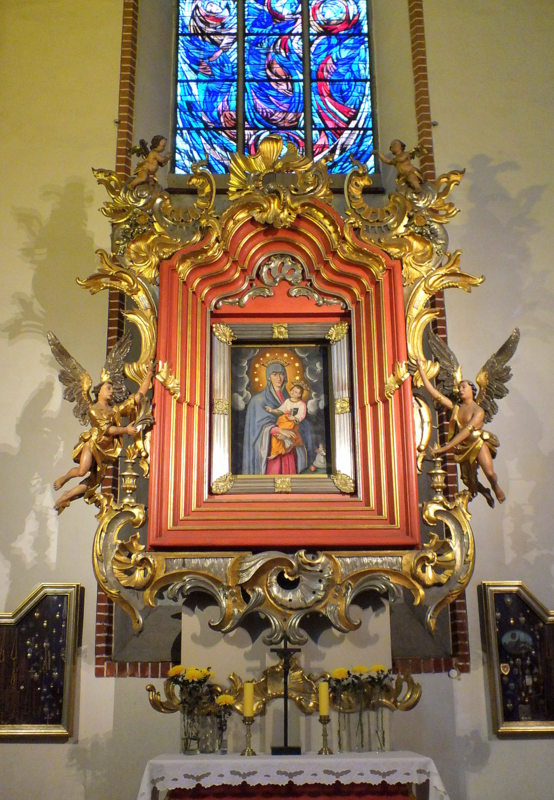 Wrocław, kościół p.w. św. Wojciecha, 1226, XVIII, 1945